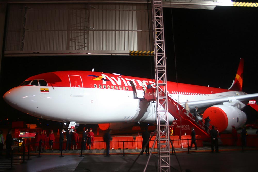 Presentación oficial del primer Airbus A330 de Avianca.